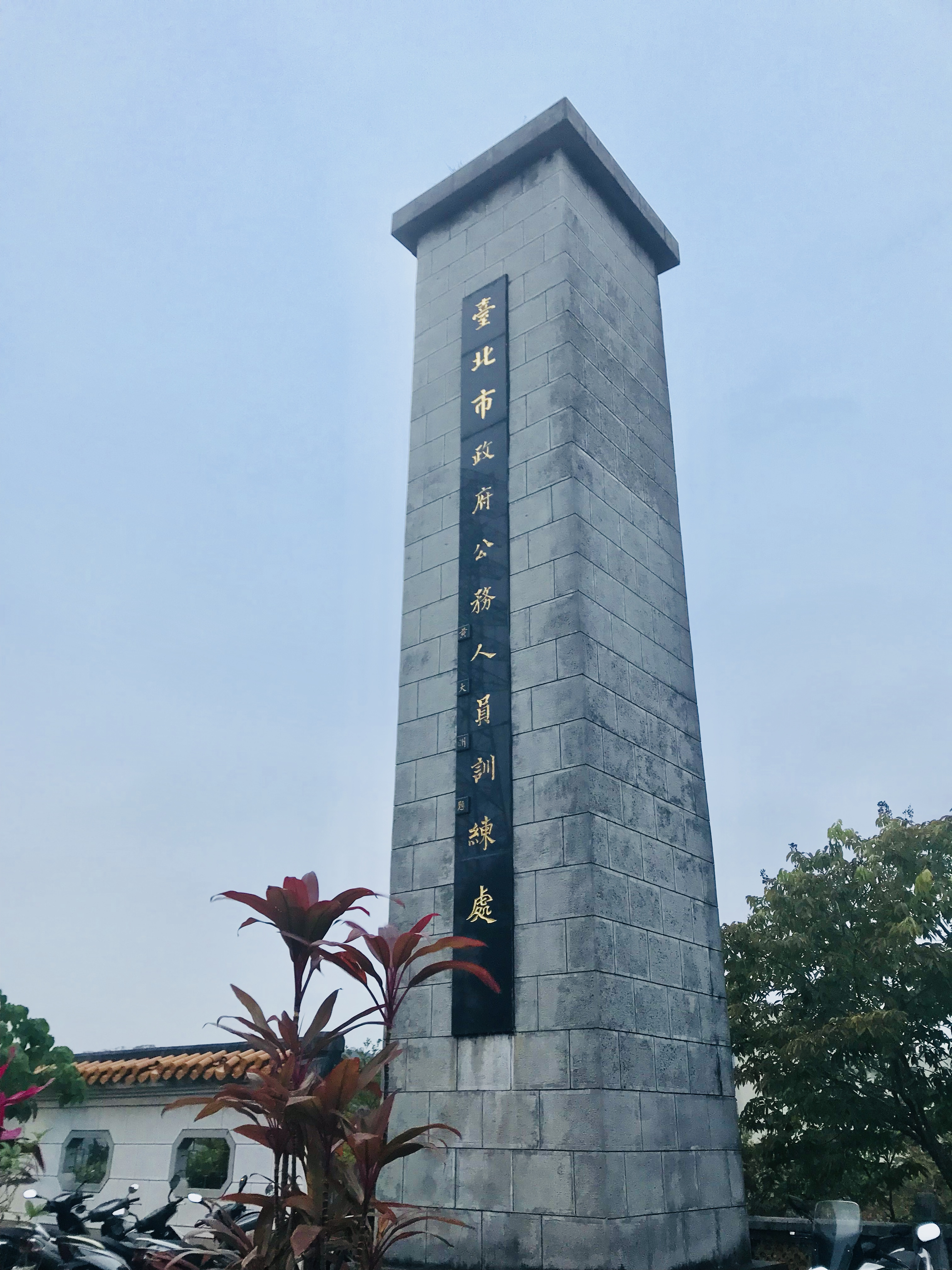 臺北市政府公務人員訓練處入口的石柱招牌